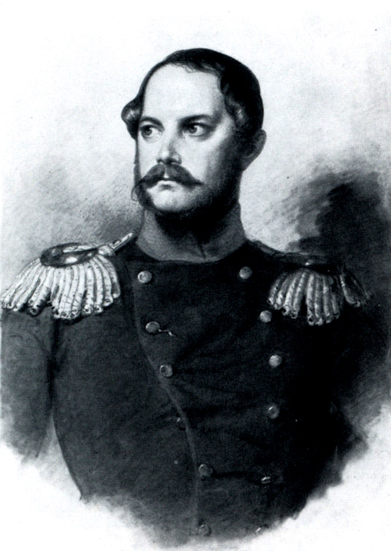 Bildnis Prinz Carl (Wilhelm Hensel, 1852)